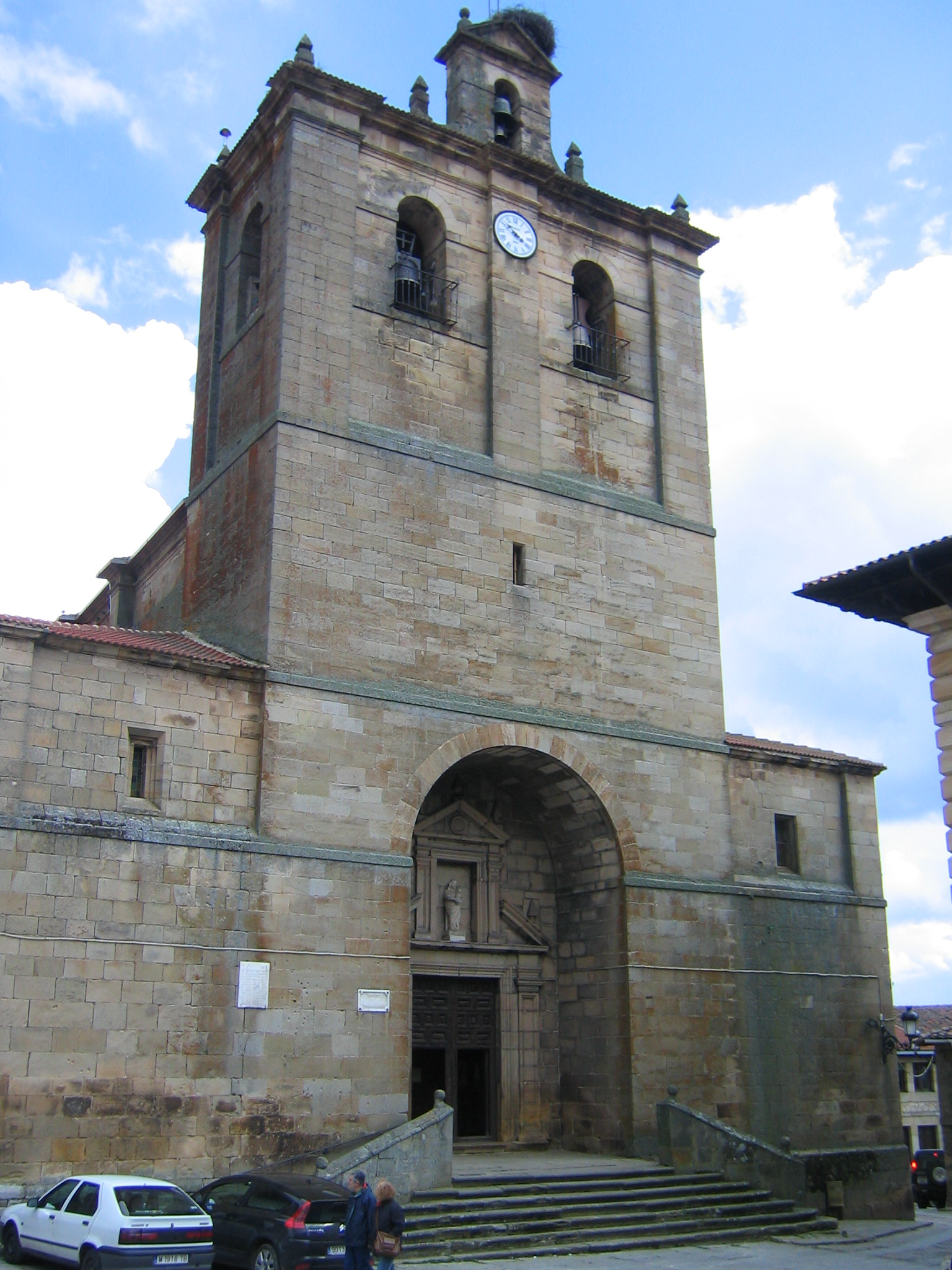 Iglesia de Nuestra Señora del Pino en Vinuesa, Soria (Castilla León) (España).